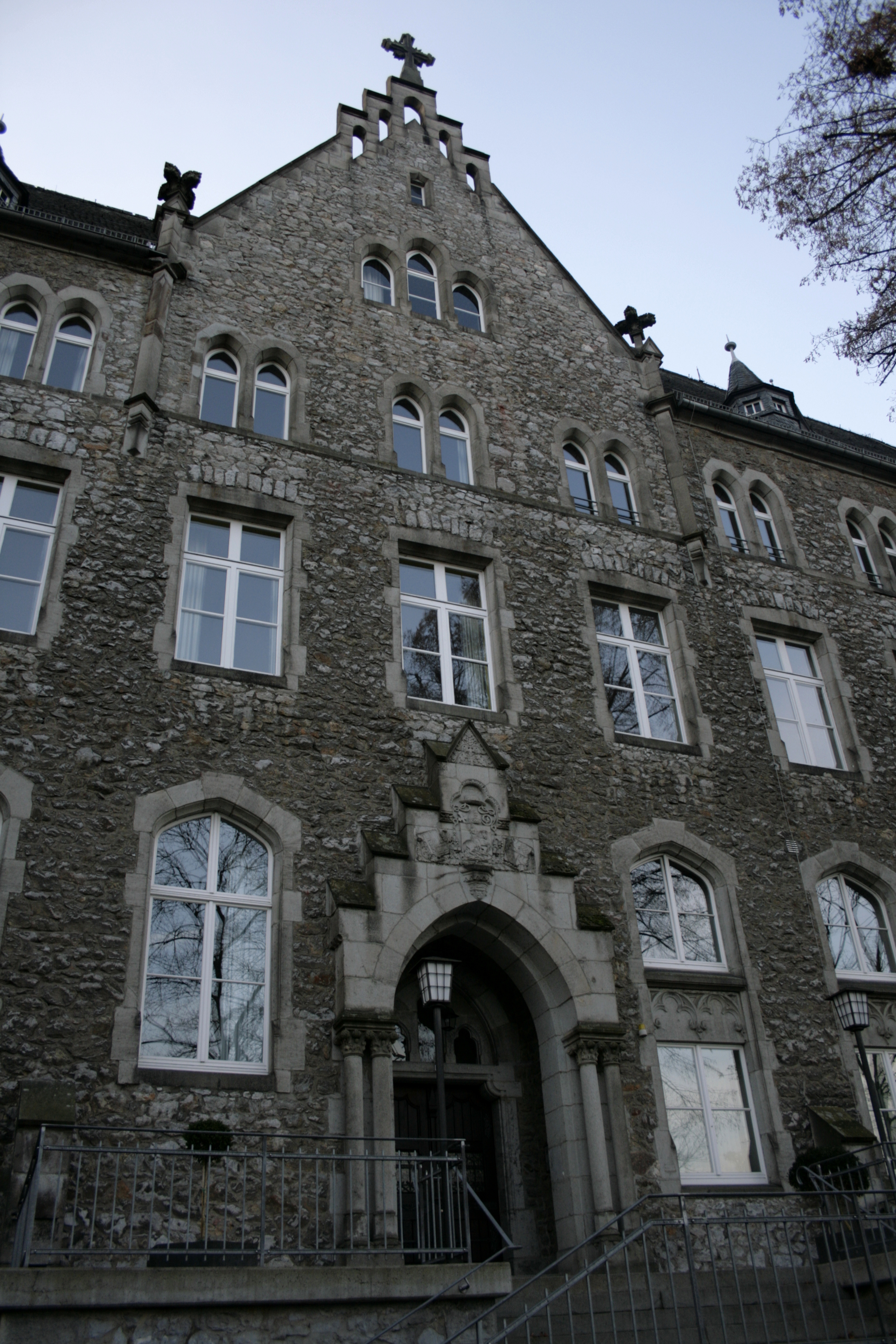 Portal des Musischen Internats in Hadamar, Deutschland